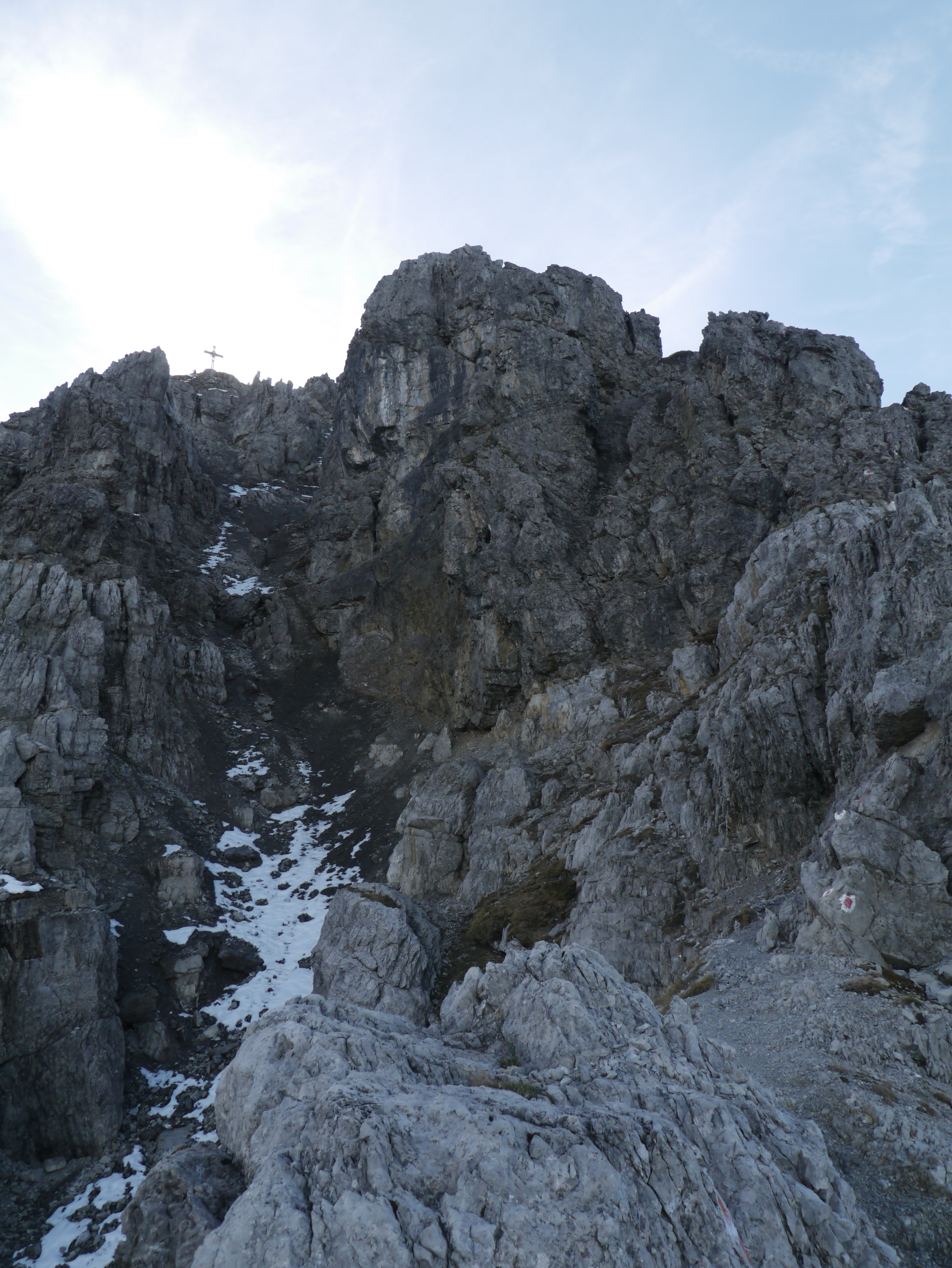 Nordseitiger Aufstieg zum Thaneller